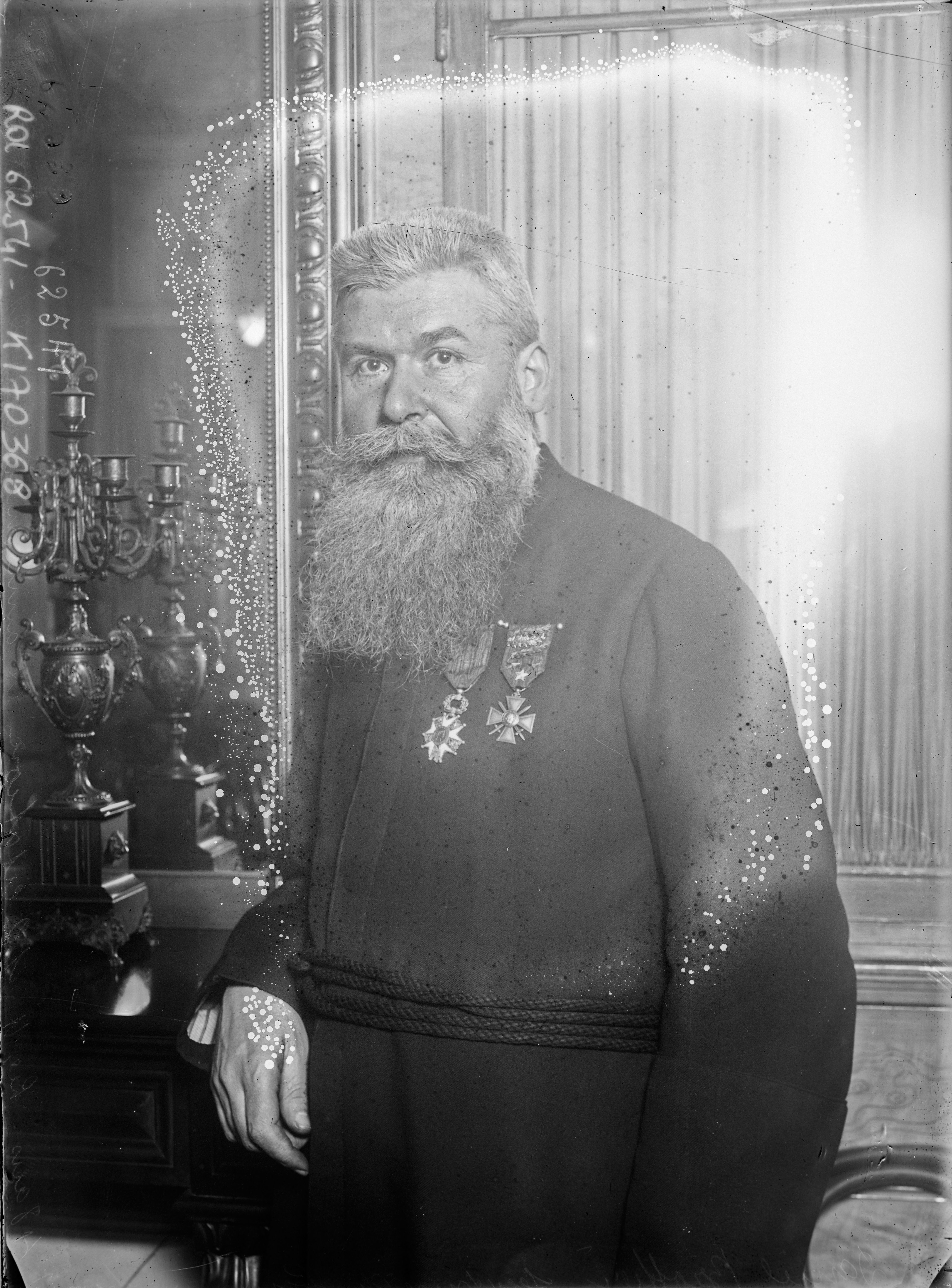 Daniel Brottier, secrétaire du Souvenir africain, 48 ans, 12 citations, ex-aumônier du 121e régiment d'infanterie.